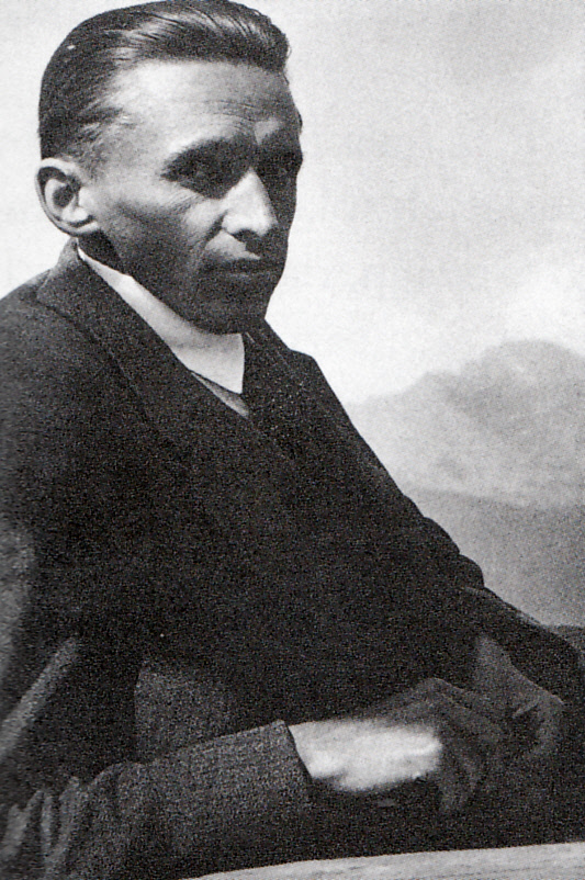 RNDr. Antonín Bečvář (* 10. jún 1901, Stará Boleslav – † 10. december 1965, Brandýs nad Labem) bol český astronóm a klimatológ. Dlhé roky pôsobil na Slovensku